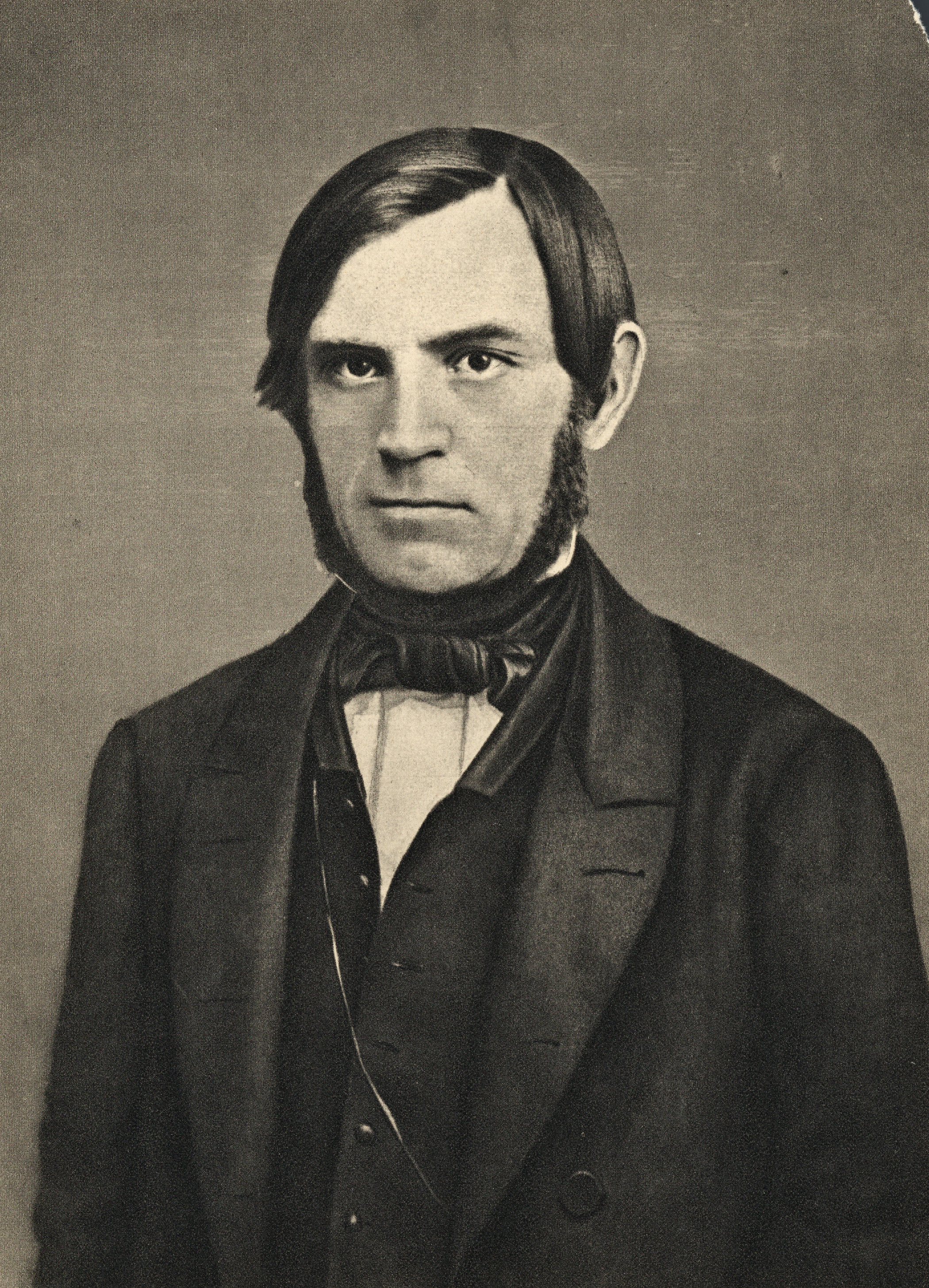 Format: Litografi Utgivelsesår / Published: ca. 1914 Utgiver / Publisher: F. Bruns Bokhandels Forlag, Trondhjem Wikipedia: Søren Jaabæk (1814 - 1894) Salmonsens konversationsleksikon: Søren Pedersen Jaabæk (1814 - 1894) Wikipedia: Odelstinget Wikipedia: Selskabet Bondevennerne Wikipedia: Folketidende (1865 - 1879) Eier / Owner Institution: Trondheim byarkiv, The Municipal Archives of Trondheim Arkivreferanse / Archive reference: Ila skole, Va - F9435